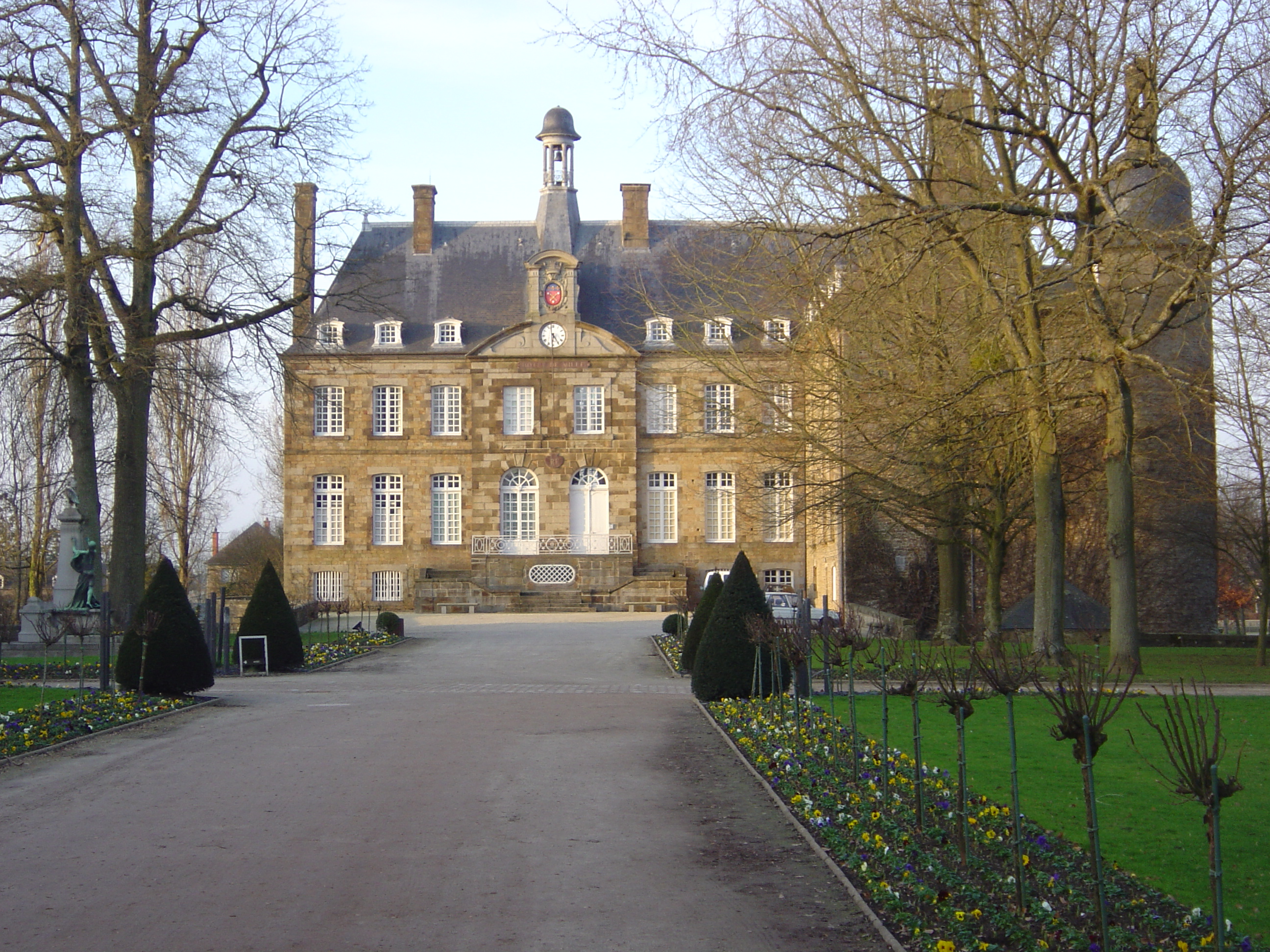 Photo du château de Flers de l'Orne (Mairie) prise le 04/02/07.